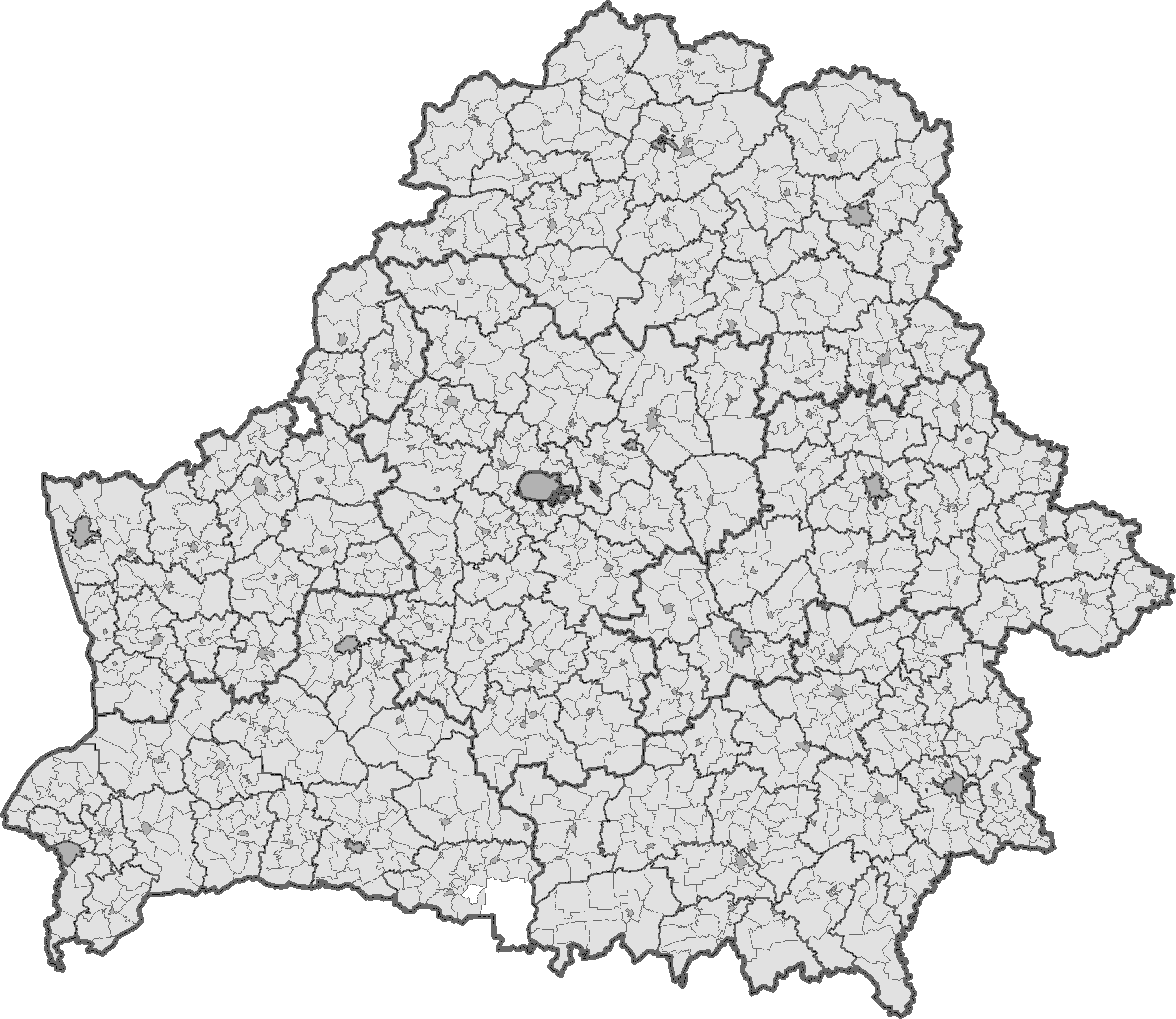 Administrative map of the Republic of Belarus with divisions of the 1st, the 2nd and the 3rd levels as of December 1, 2009 (according to the Presidential Decree No. 104 of March 15, 2019)